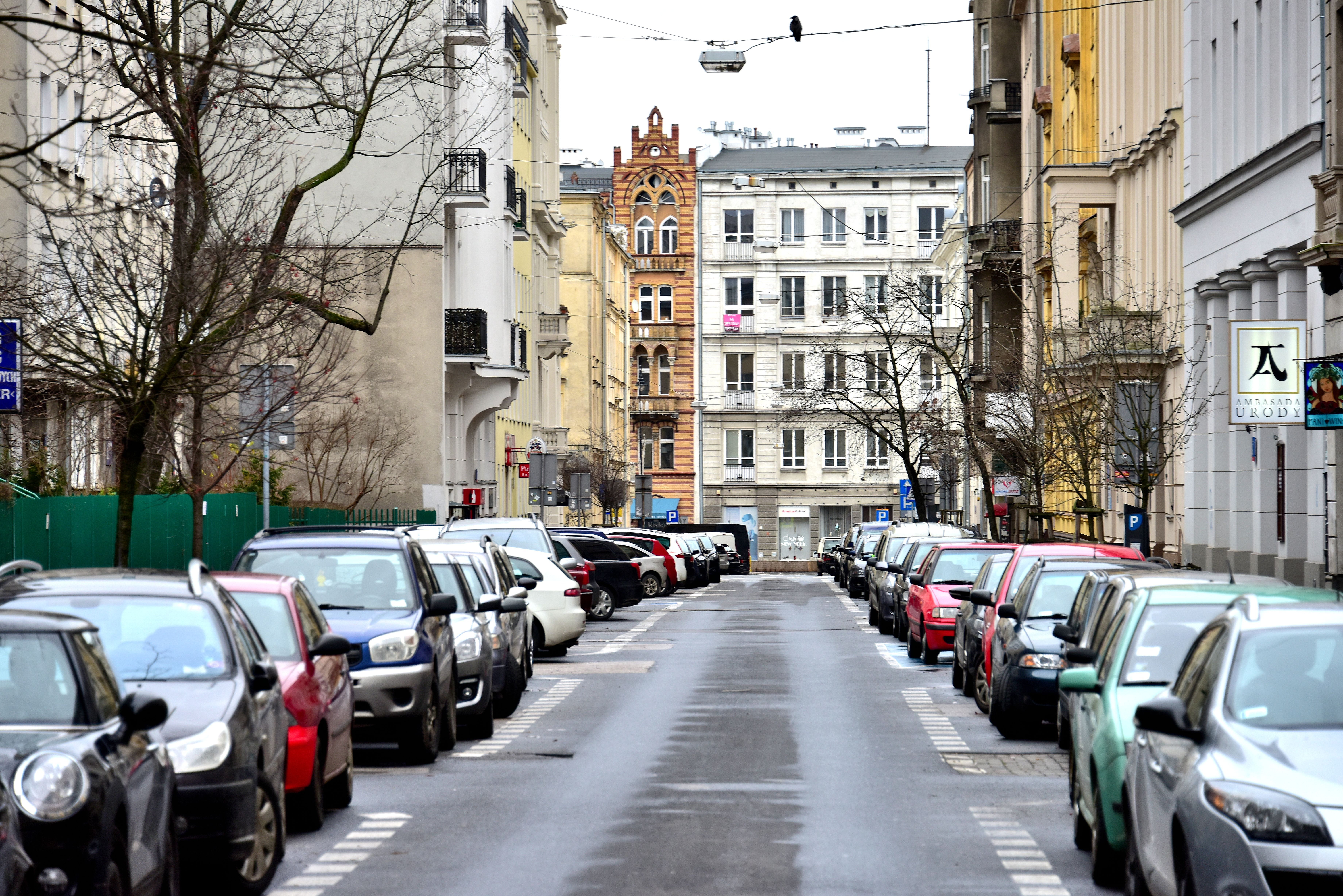 Ulica Wilcza w Warszawie na odcinku pomiędzy ulicą Kruczą i Alejami Ujazdowskimi